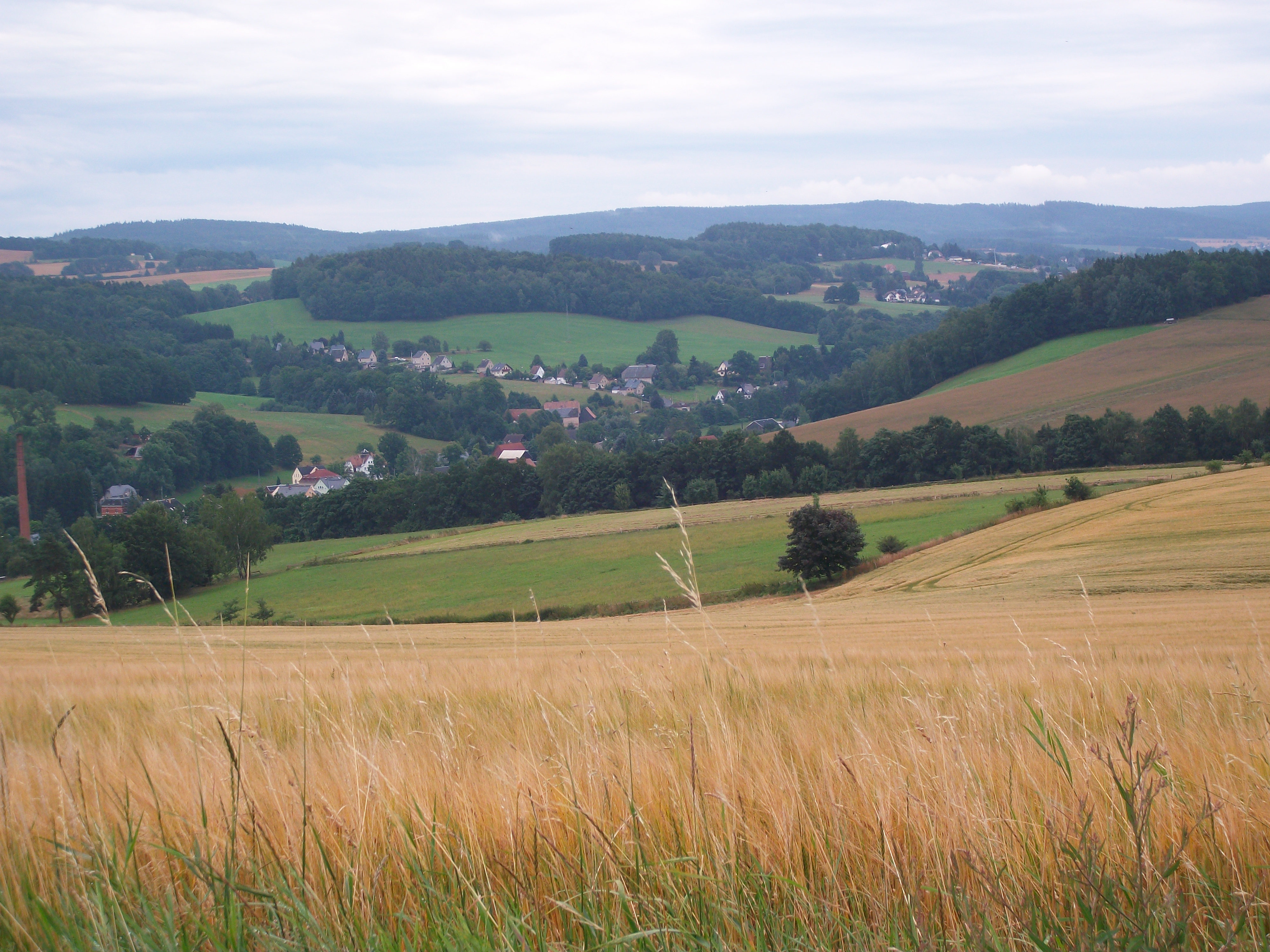 Blick auf Cunersdorf im Rödelbachtal